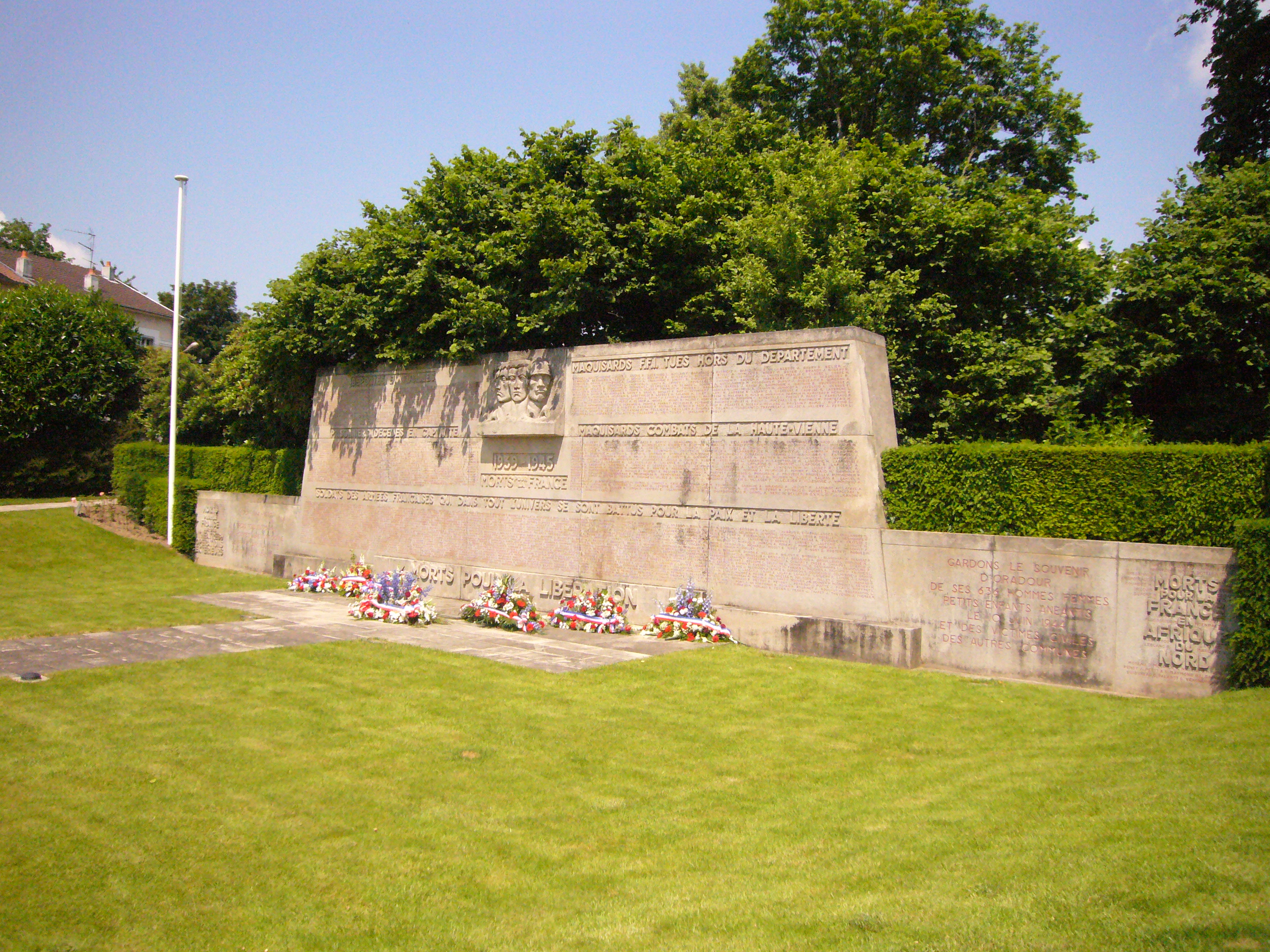 Monument aux morts du Jardin d'Orsay (Limoges, 87, France)